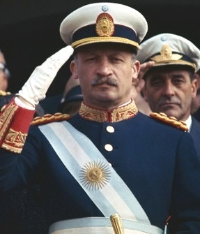 Es una foto de frente del presidnete de facto Juan Carlos Ongania Carballo.